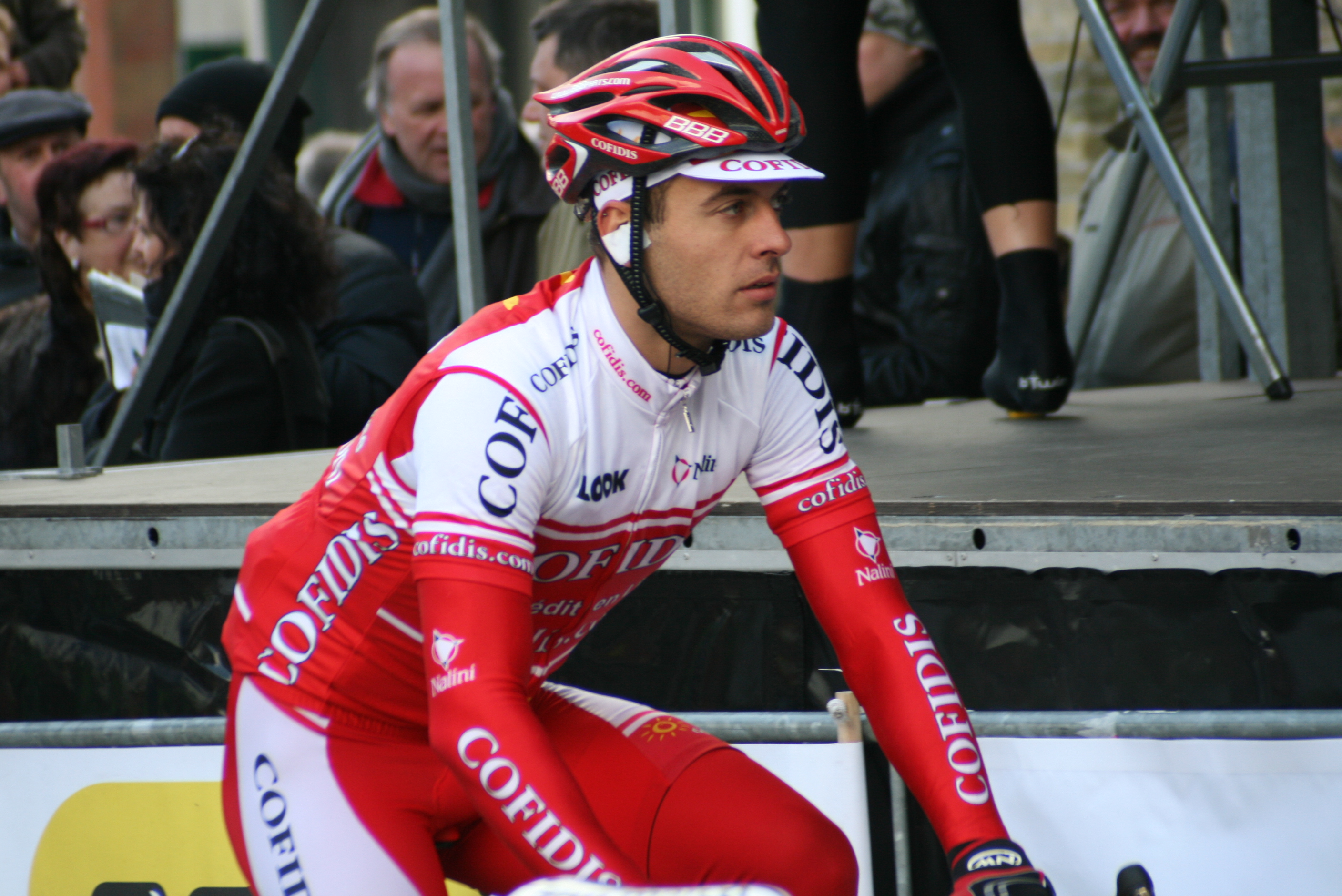 Kevyn Ista lors des Trois jours de Flandre occidentale 2010